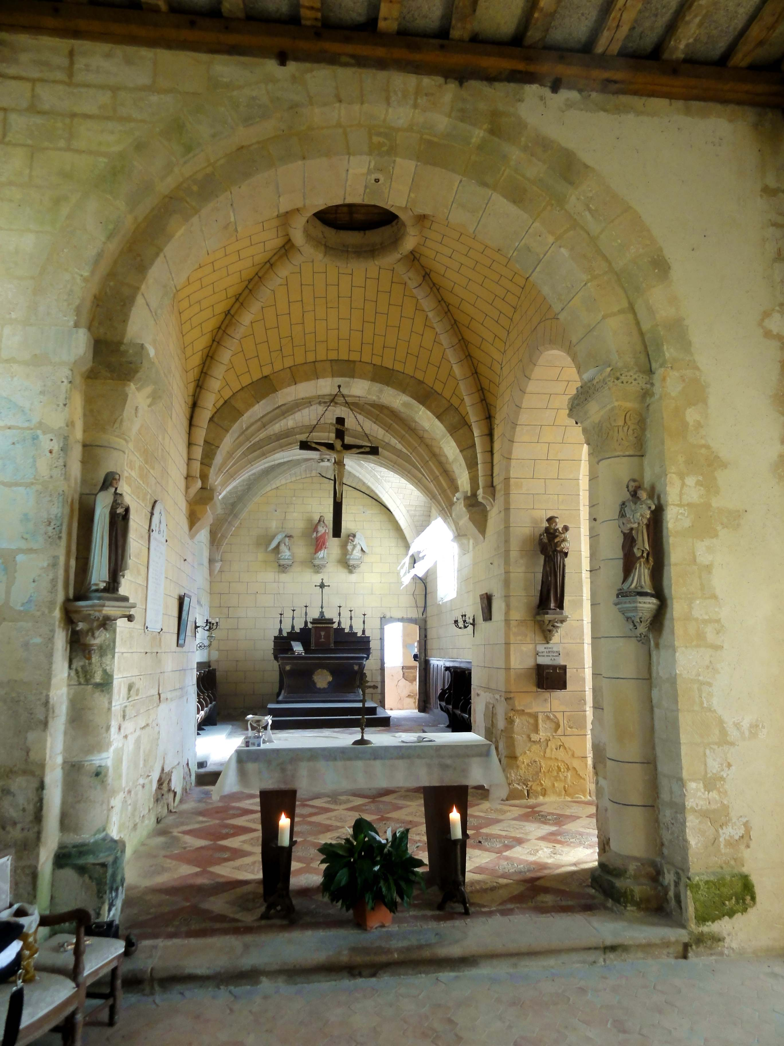 Intérieur de l'église - voir titre.